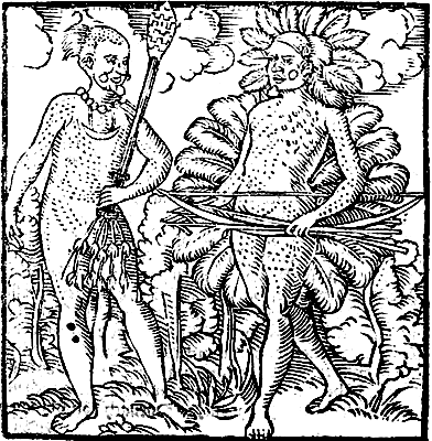 Xilogravura. Dois Chefes Tupinambás com os Corpos Adornados por Plumas - ilustração do livro "Duas Viagens ao Brasil" de Hans Staden (1557)